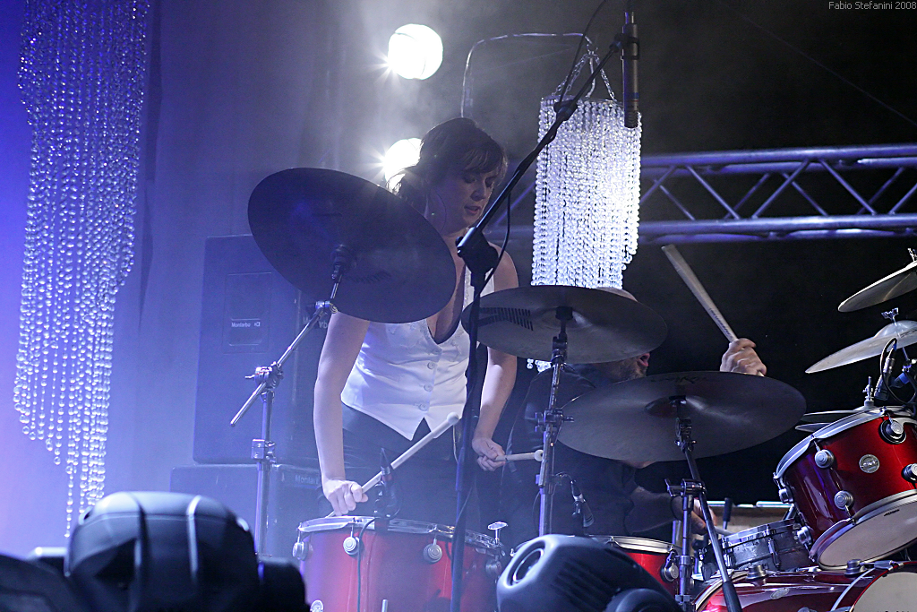 Cristina Donà live al Circolo Arci Magnolia, Segrate (MI), 9.7.2008